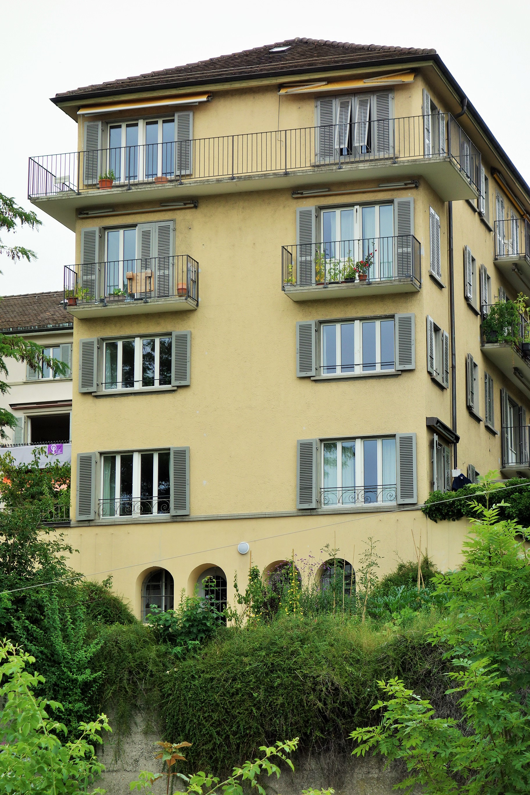 Wohnkolonie für alleinstehende Frauen im Lettenhof, Zürich, Schweiz